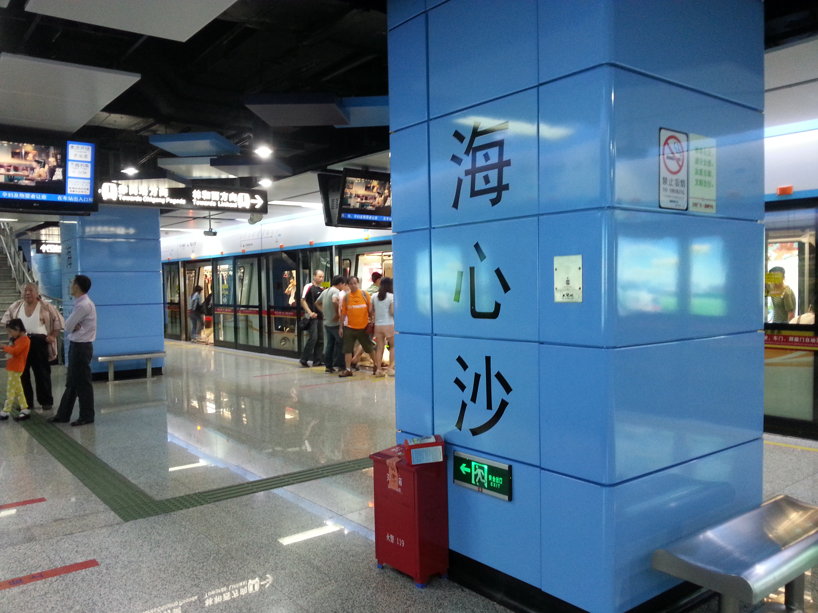 中文（香港）: 廣州地鐵APM線海心沙站